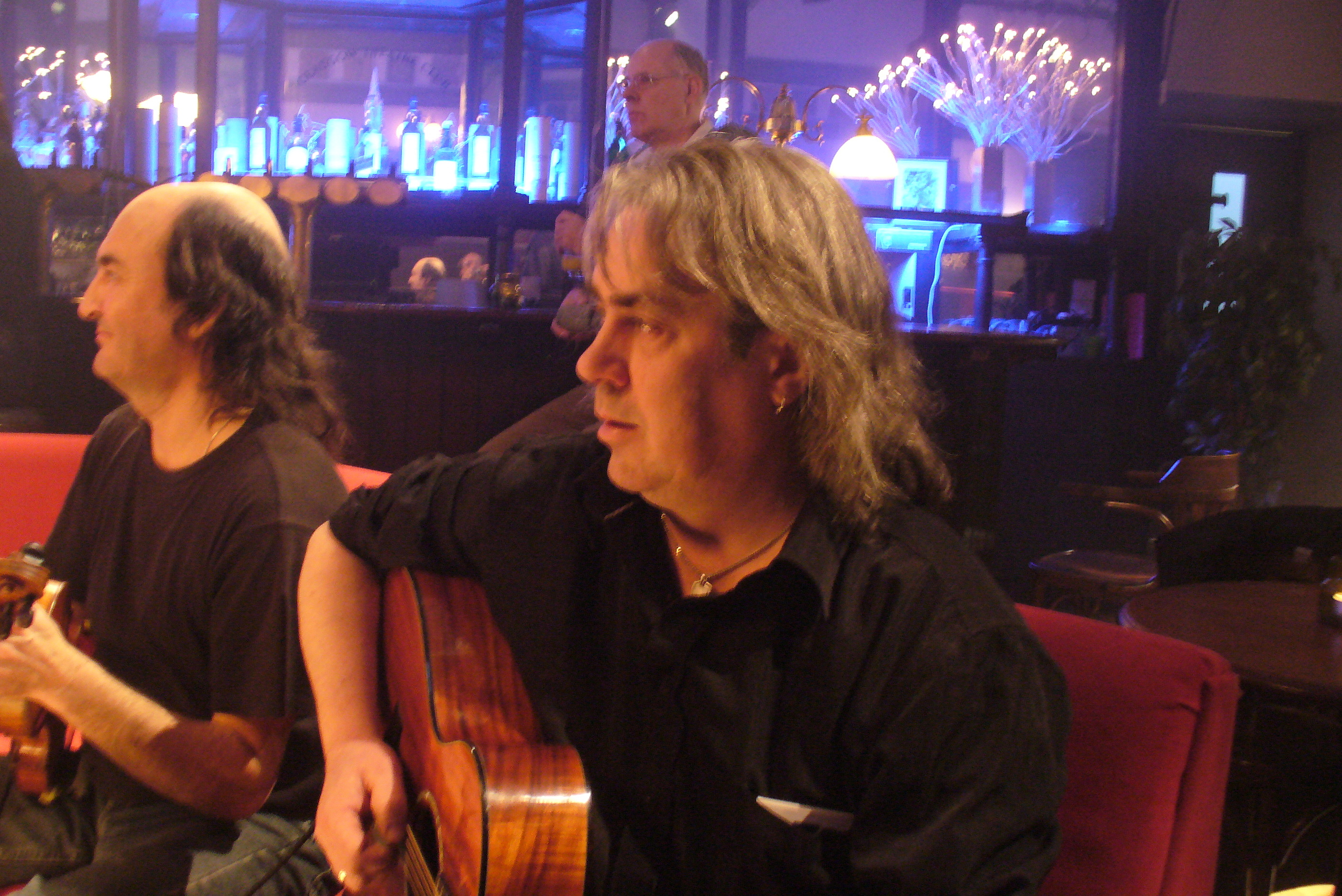 Jacky Molard et Nicolas Quemener avec le groupe Pennoù Skoulm sur la chaine de télévision écossaise BBC Alba en 2010.